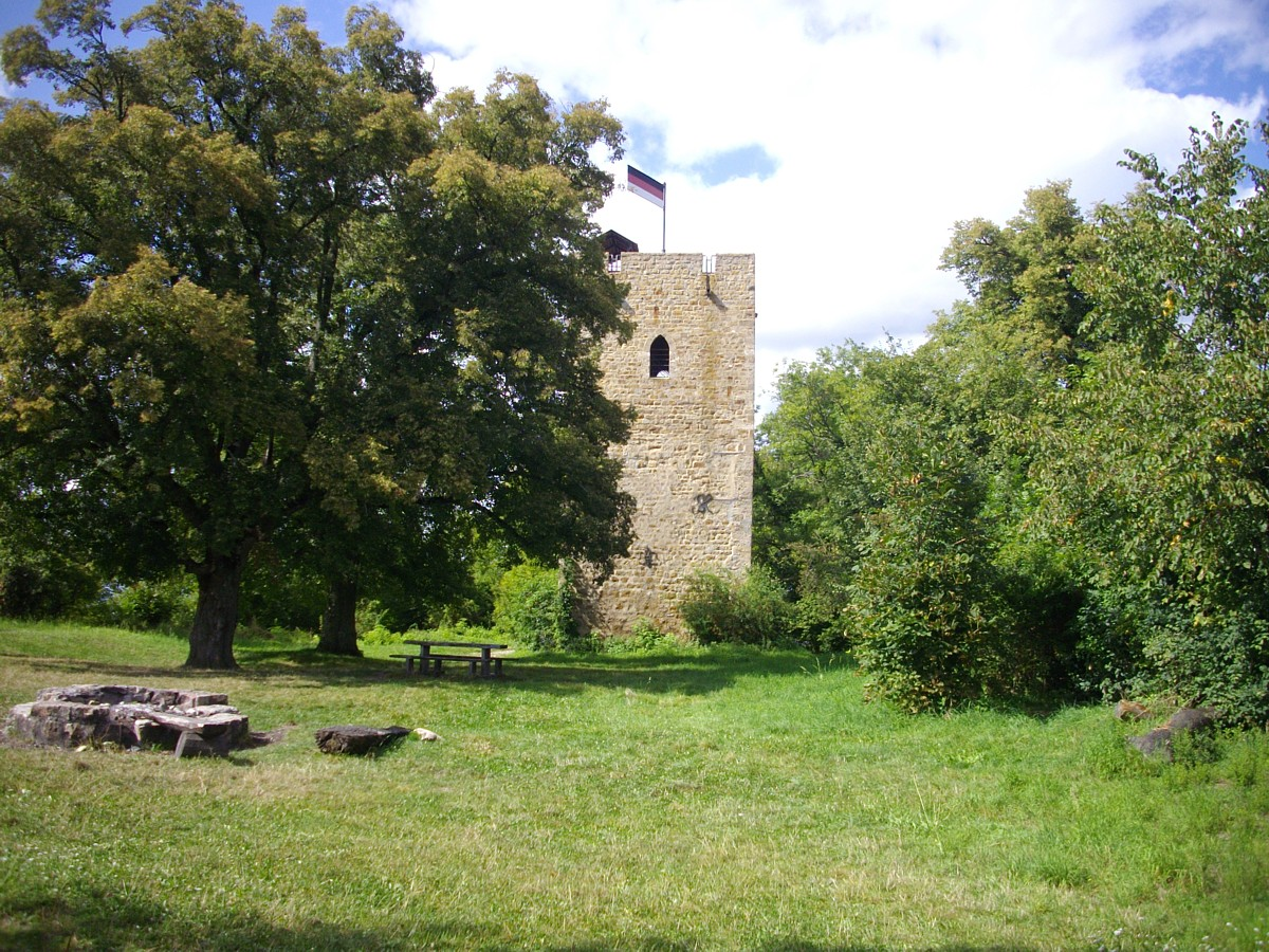 Reutlingen, Aussichtsturm auf der Achalm (707 m) mit Rastplatz